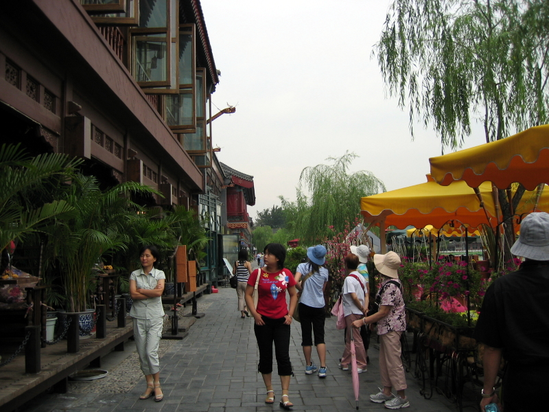 Shichahai F&B Outlet View 2004 什剎海酒吧區